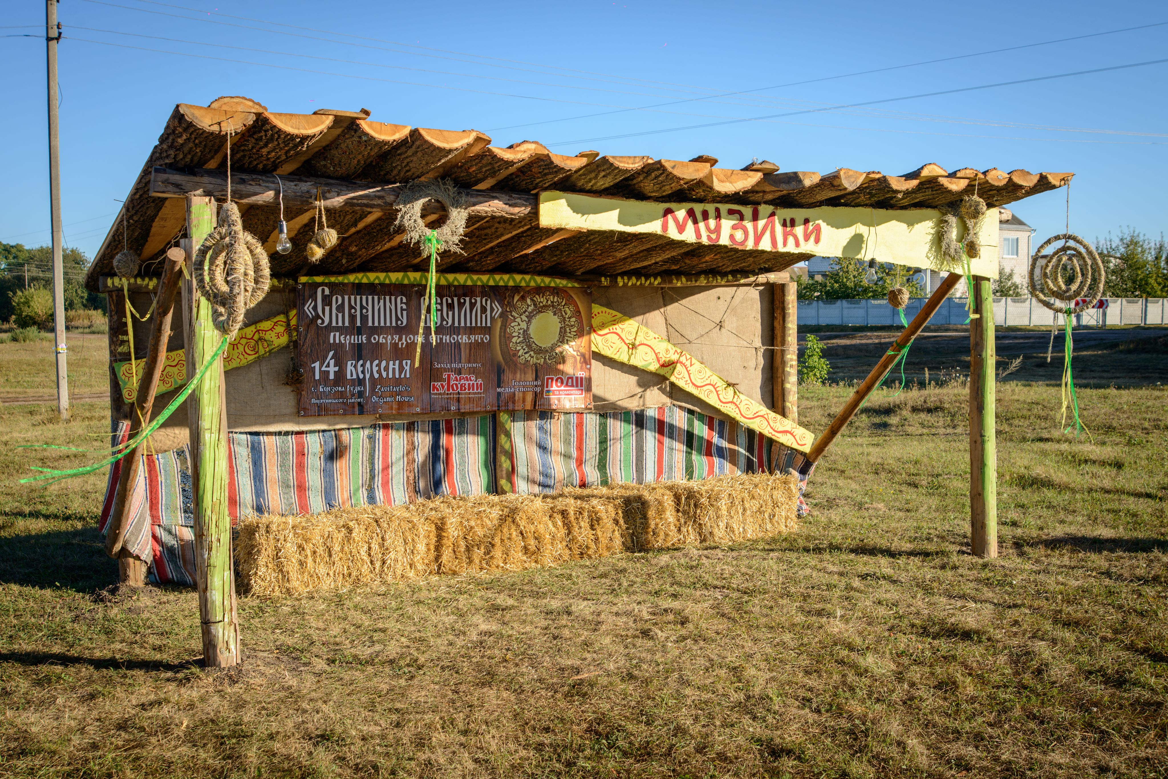 Так виглядає місце проведення етнографічного фестивалю «Свіччине весілля» у 2016 році у Березовій Рудці Знято під час Вело-вікі-експедиція селами Гребінківського та Пирятинського районів